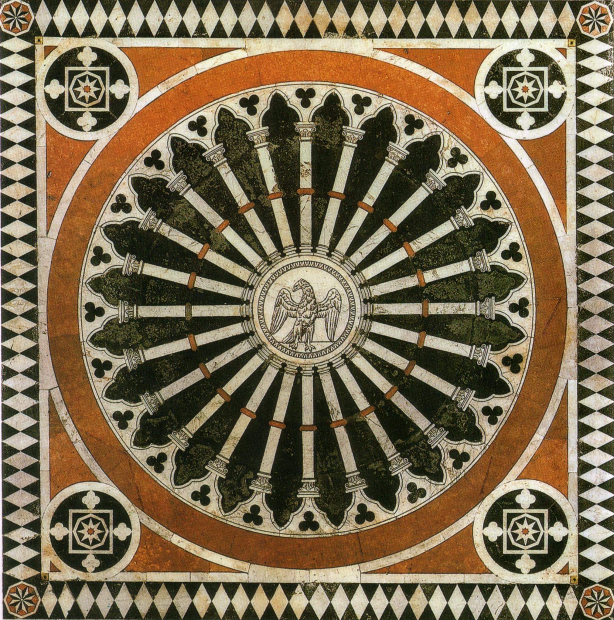 Pavimento di siena, aquila imperiale